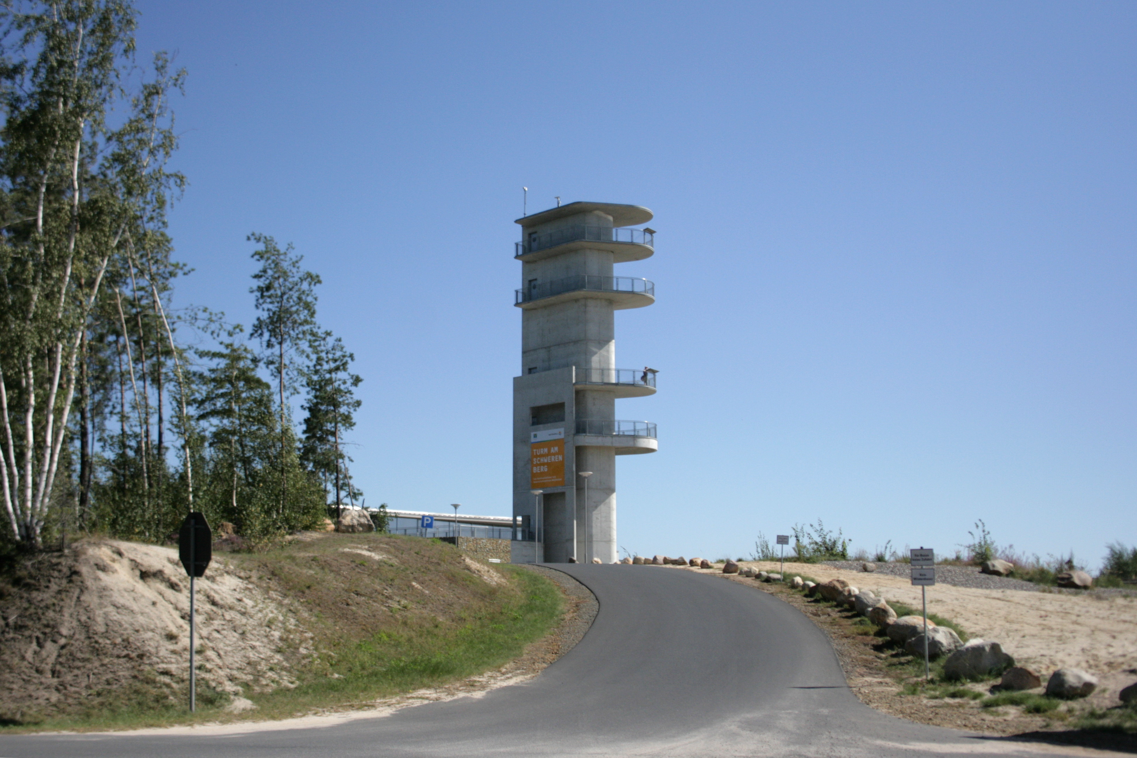 Turm am Schweren Berg am Tagebau Nochten in Weißwasser